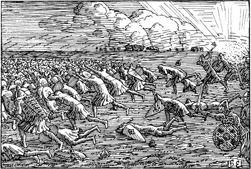 Halfdan Egedius: Illustration for Magnus den godes saga. Snorre 1899-edition. «Slaget paa Lyrskogshede.» nb: «Slaget på Lyrskoghede.» nn: «Slaget på Lyrskoghede.»